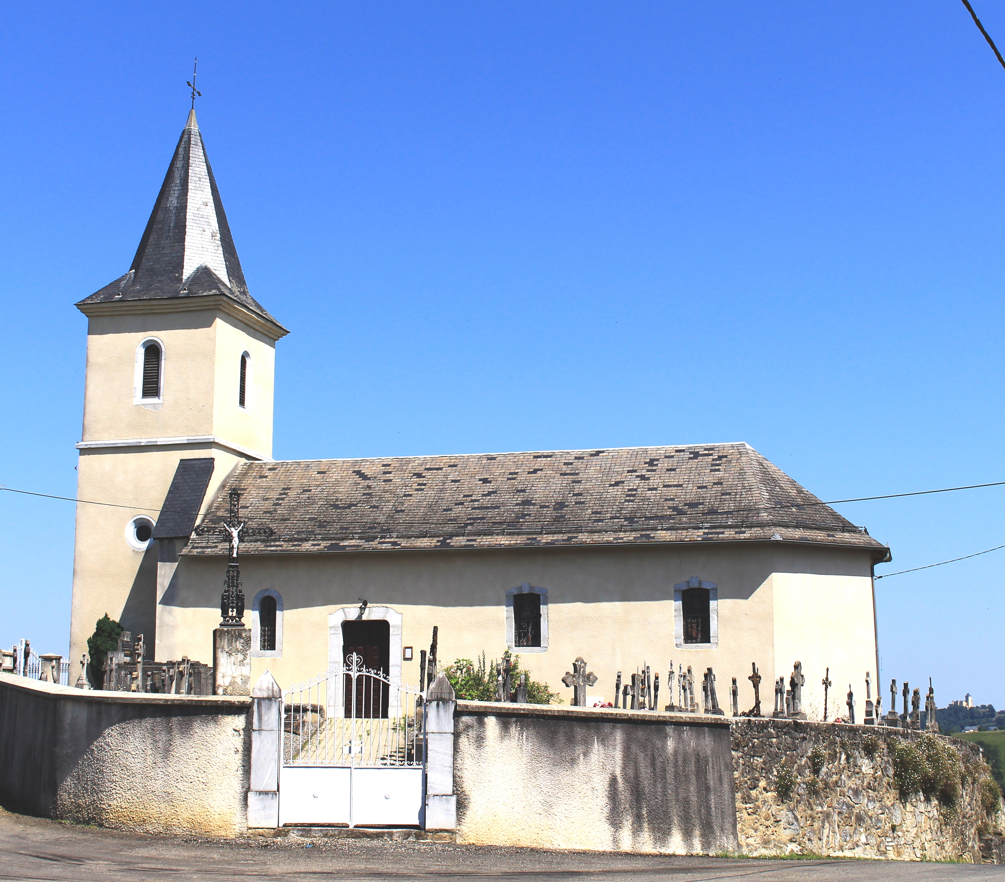 Église Saint-Martin de Sarlabous (Hautes-Pyrénées)